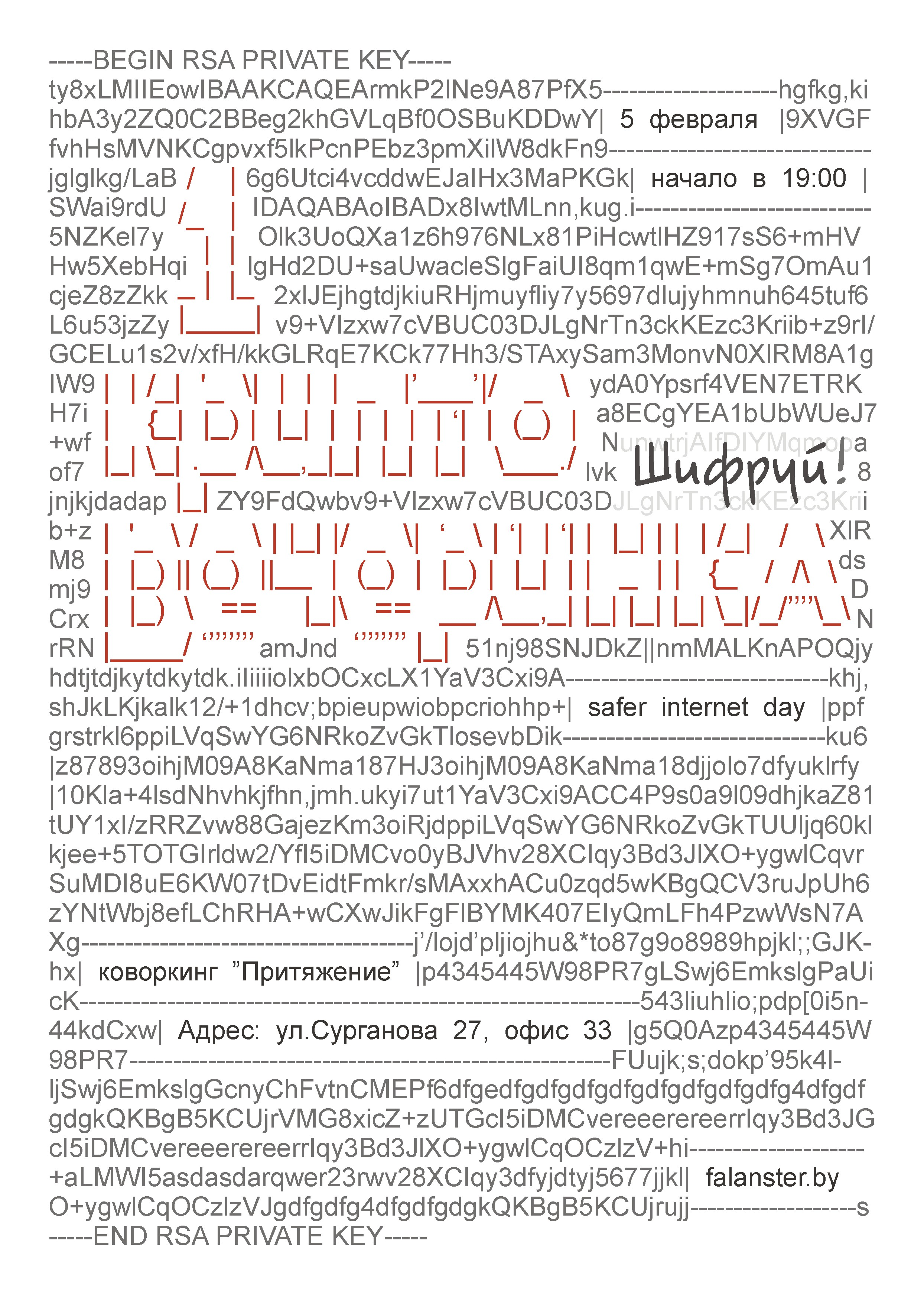 Афиша. Первая криптовечеринка в Минске, Беларусь